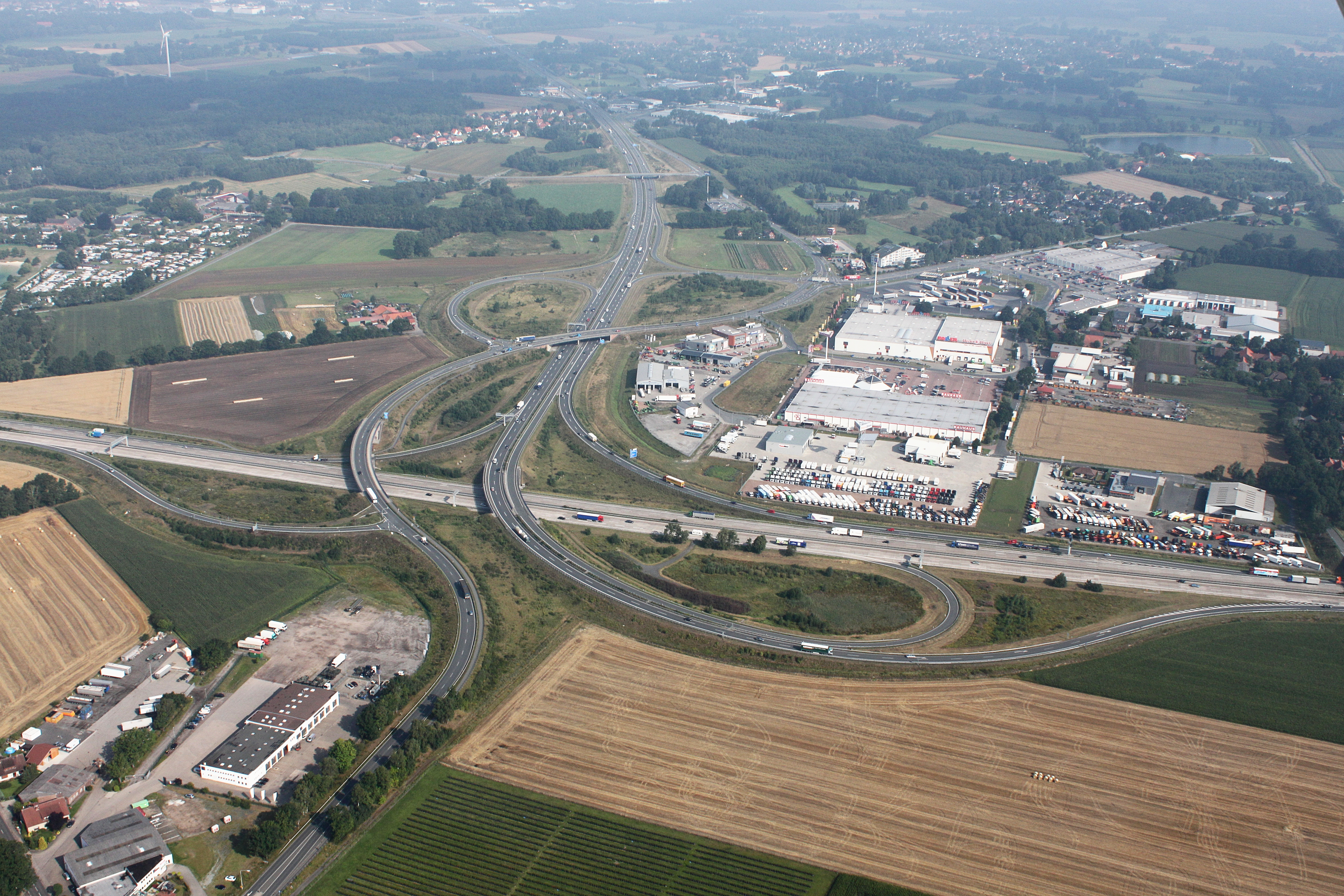 Luftaufnahme; entlang der A1 (auf der Südseite) vom Dreieck Stuhr in Richtung Osten, bis zur Abfahrt Brinkum